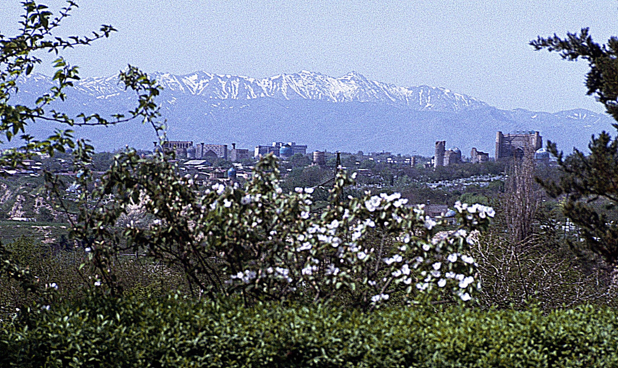 Samarkand vom Tal-i Rassad